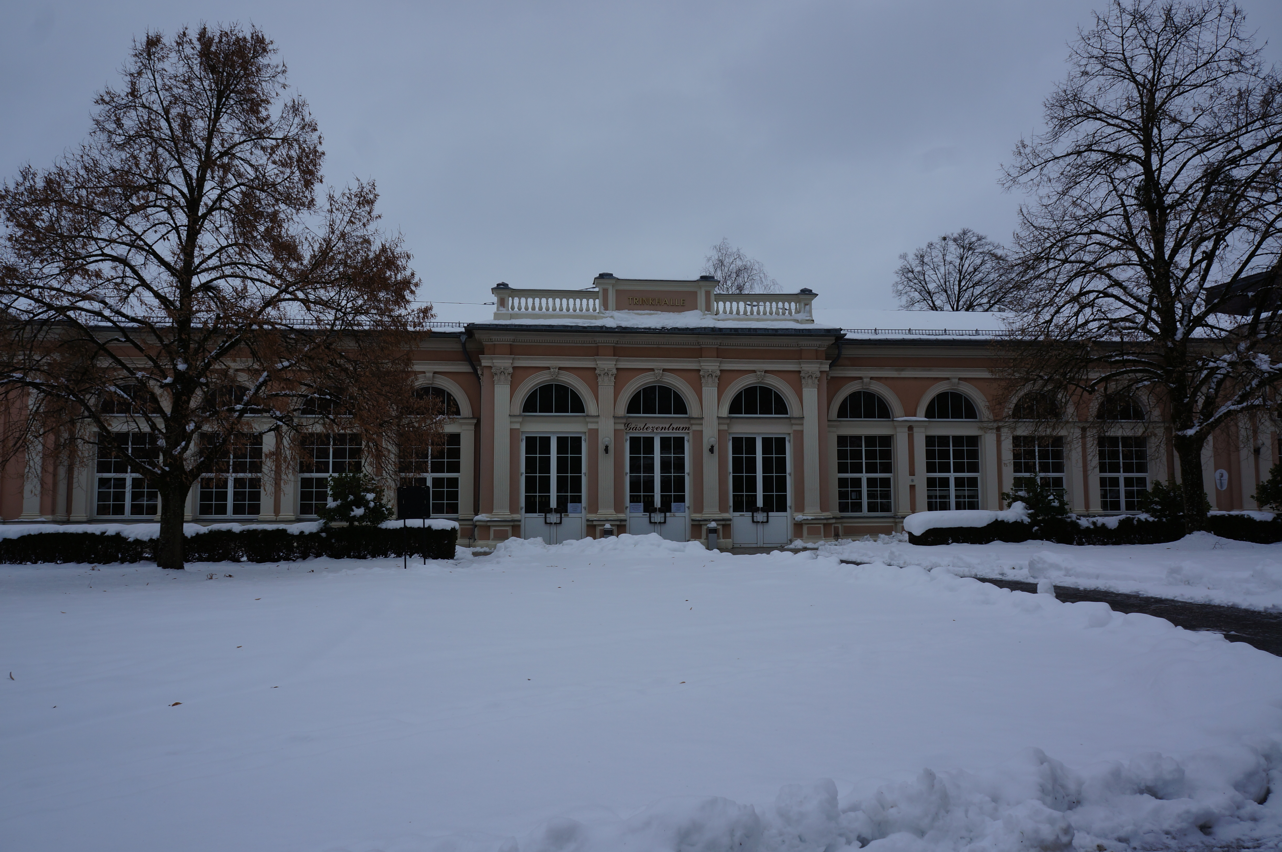 Trinkhalle (heute Gästezentrum Bad Hall) im Kurpark Bad Hall